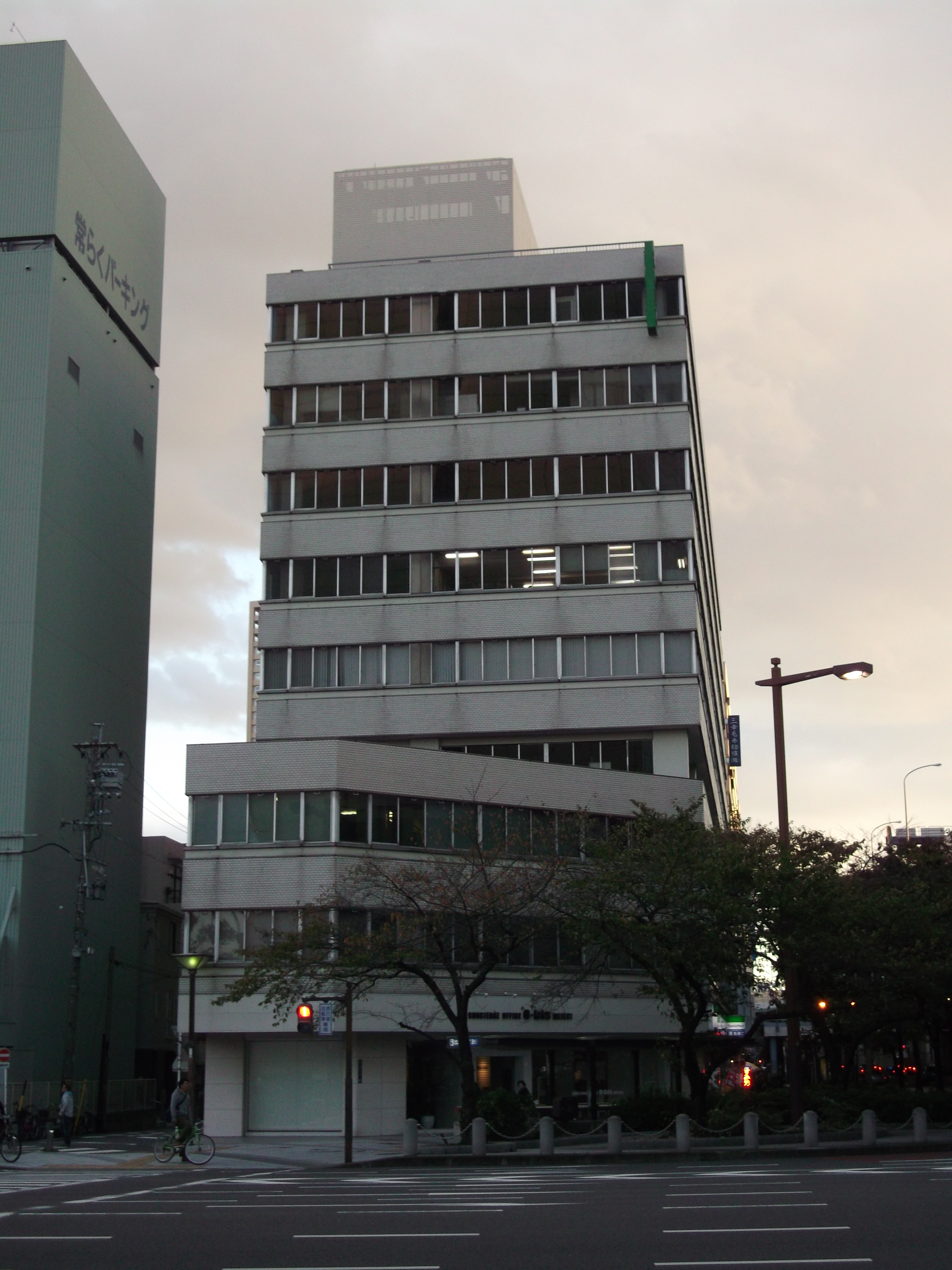 名古屋市中村区名駅の花車ビル北館を西側公道北側より撮影